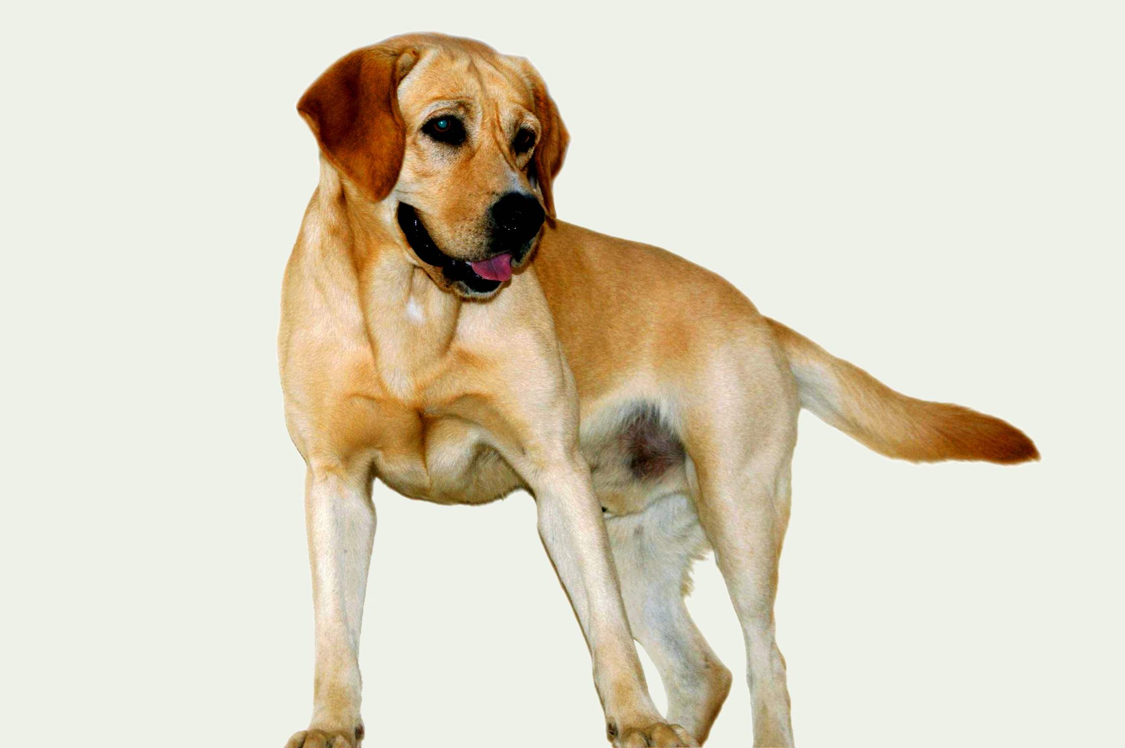 ലിയോ എന്ന ലാബ്രഡോർ വളർത്തുനായ